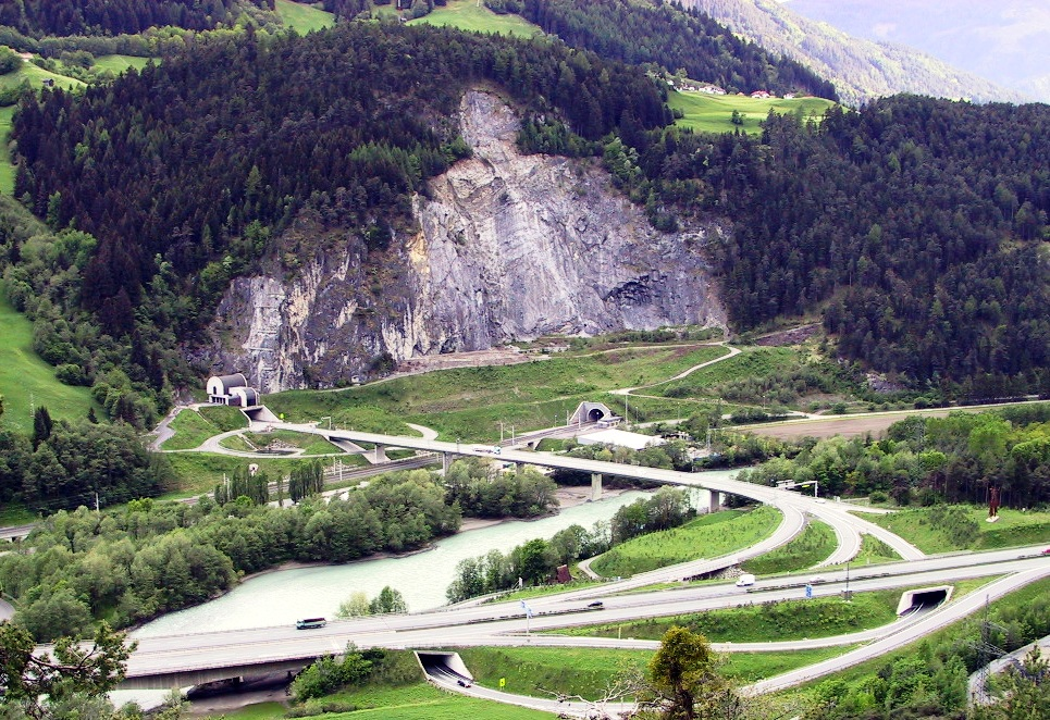 Nordportal vom Landecker Tunnel (Straße) und Ostportal vom Zammer Tunnel (Eisenbahn). Im Vordergrund sind zudem die Anlagen des Oberinntaldreiecks der A12 Inntalautobahn zu sehen.